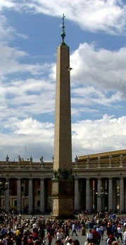 Vatican Obelisk